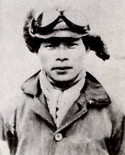 武藤金義は日本海軍の戦闘機搭乗員。